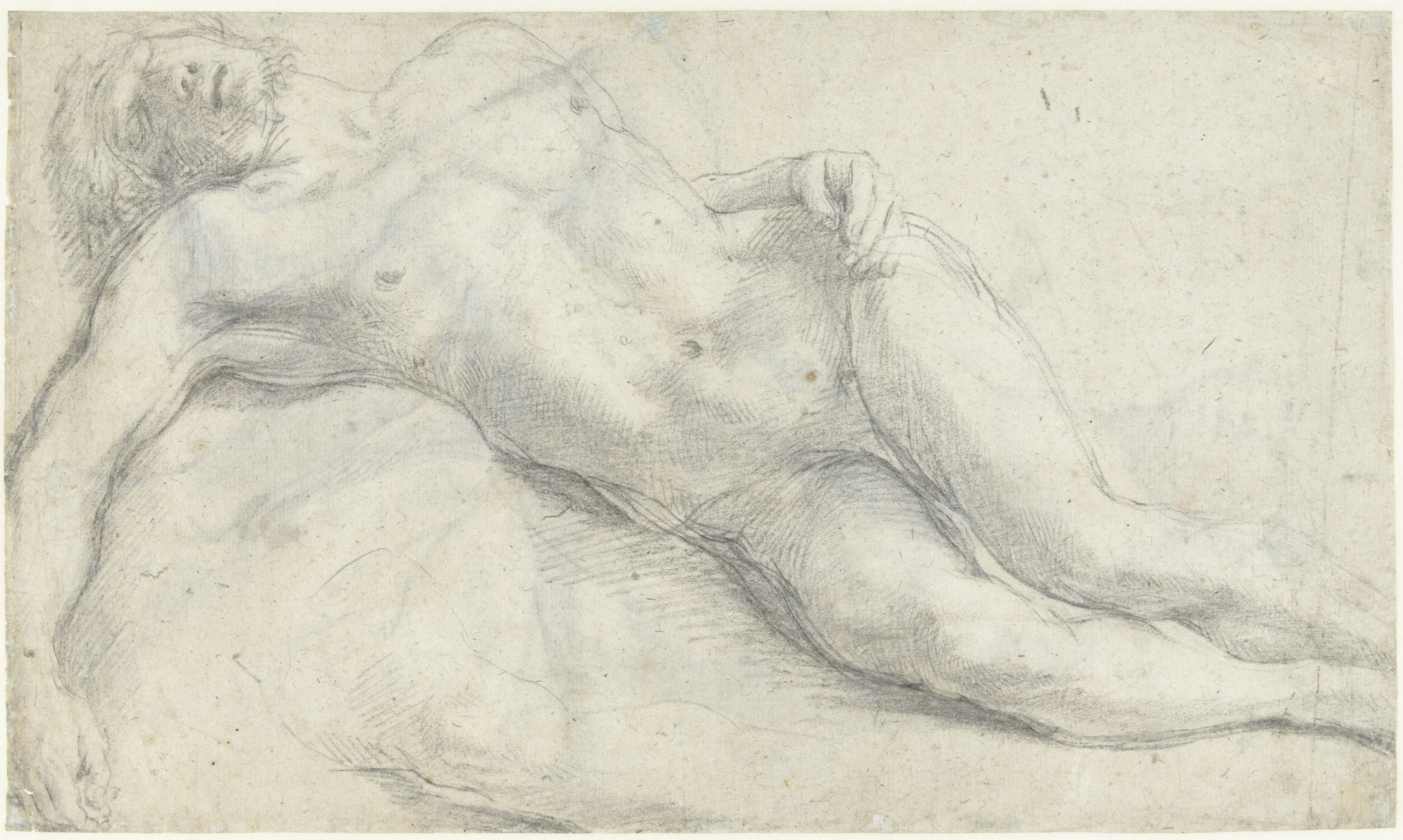 Studio di Cristo in Pietà